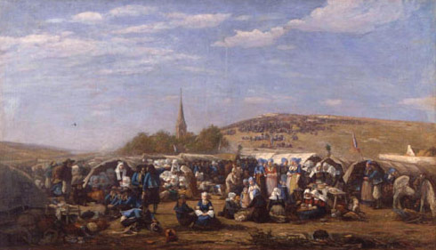 Le pardon à la chapelle Sainte-Anne-la-Palud à Plonévez-Porzay (Finistère)